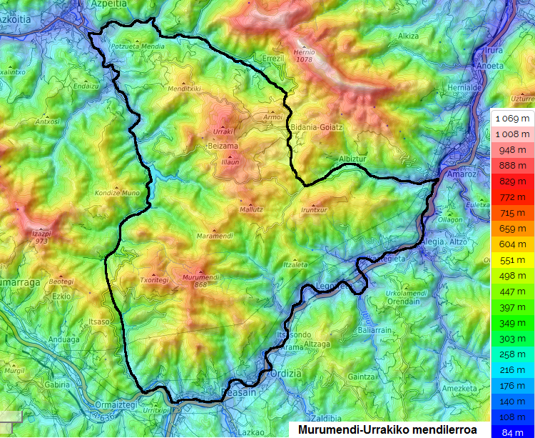 Murumendi-Urrakiko mendilerroaren mapa topografikoa.